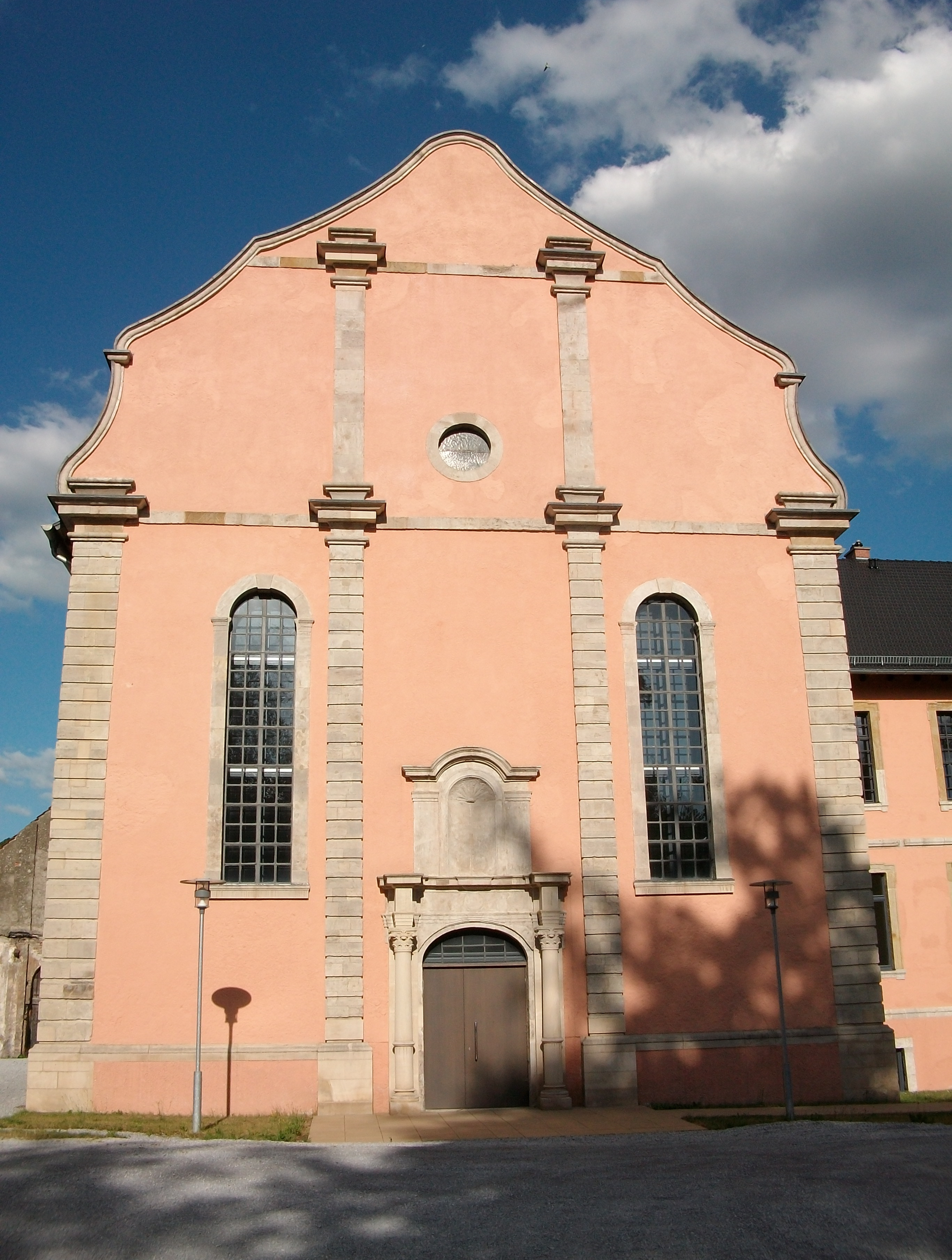 Kloster in Marsberg-Bredelar (Germany)